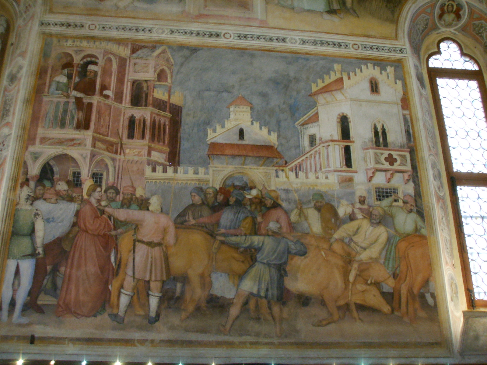 Altichiero, oratorio di san giorgio, pareste sinistra, Santa Lucia trascinata al postribolo